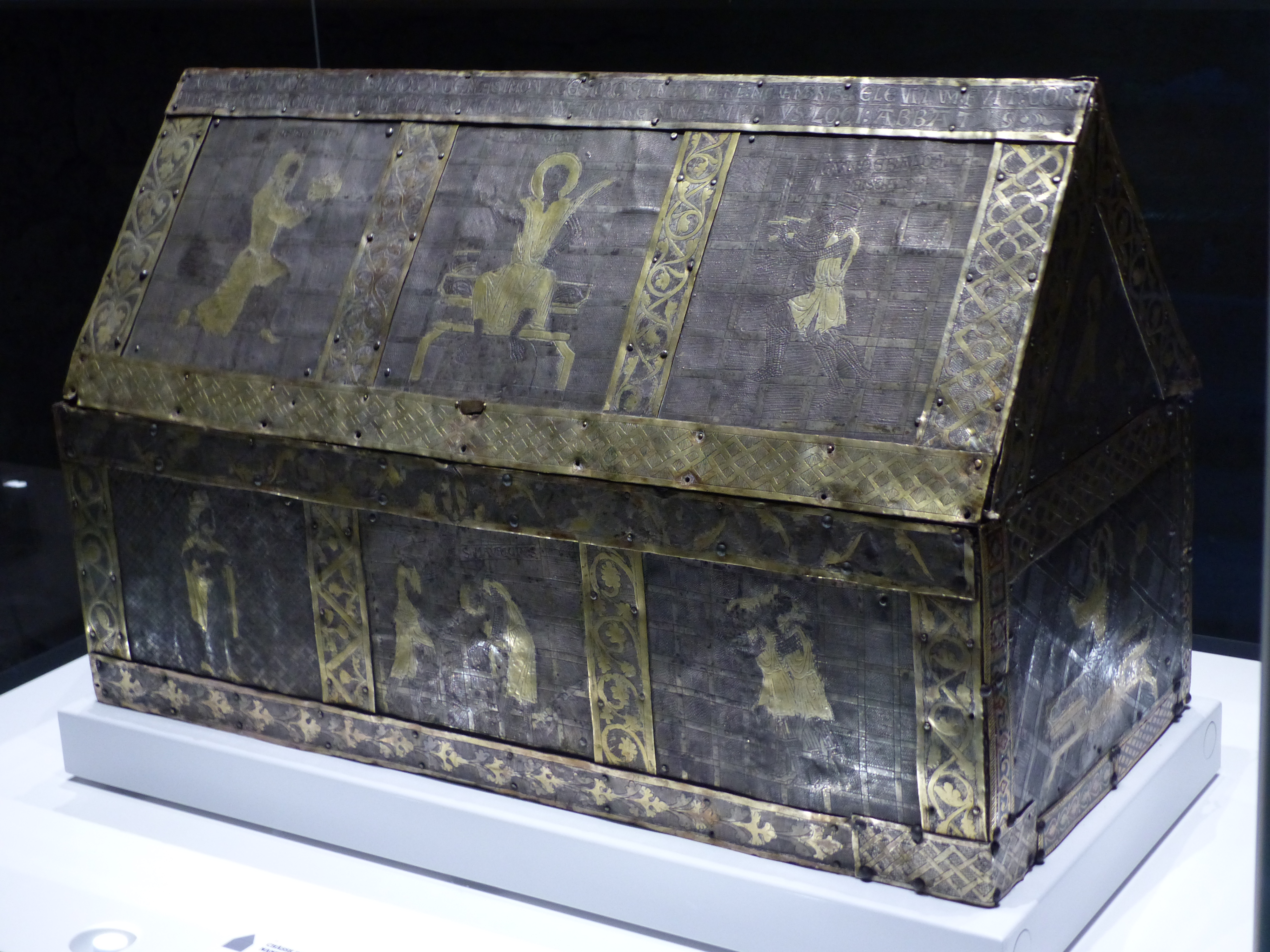 Nantelmusschrein, ca. 1225 vom Abt Nantelm bei einem Straßburger Goldschmied in Auftrag gegeben. Abbaye de Saint-Maurice d'Agaune.